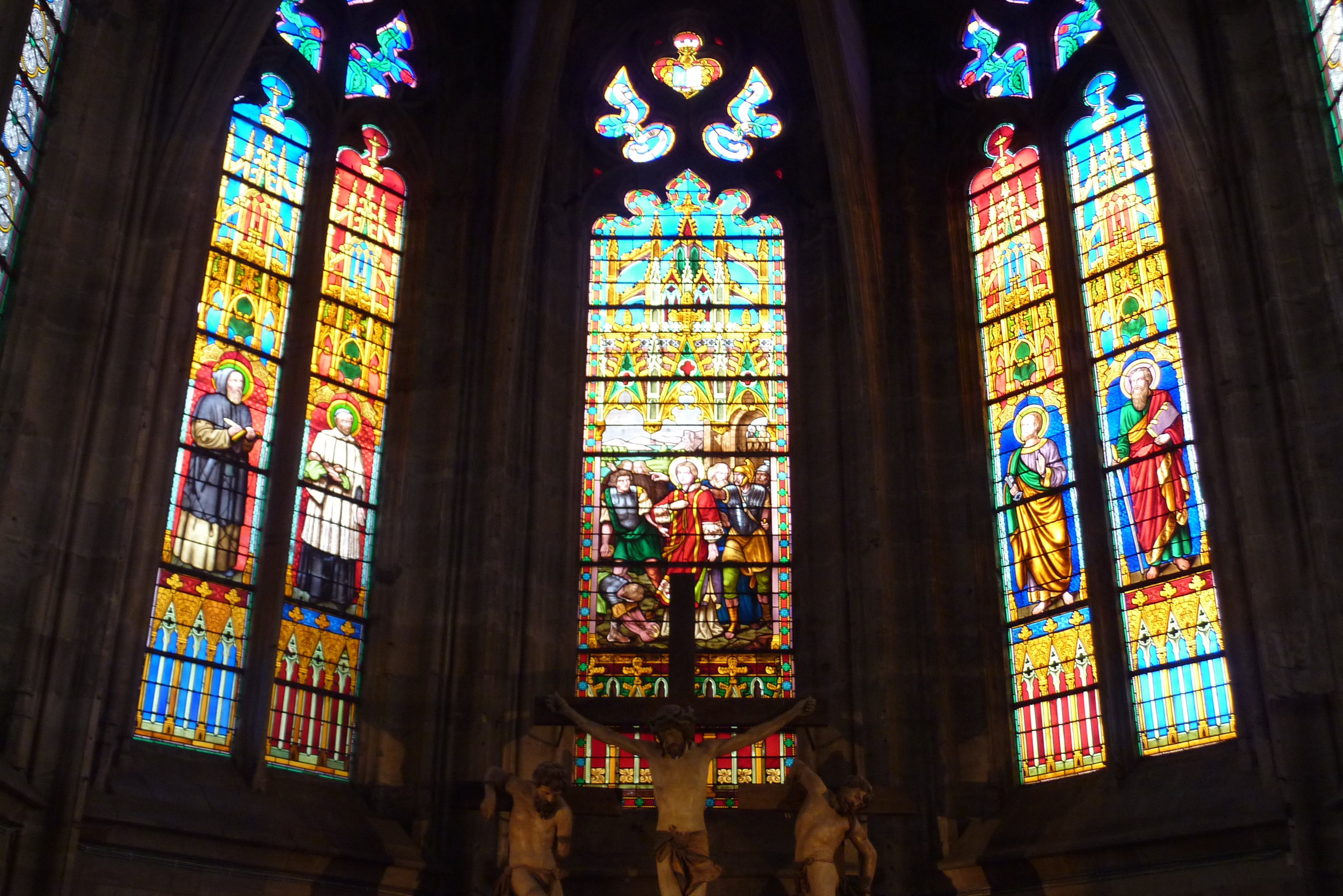 Vitraux de Höner Victor datant du XIXe siècle situés dans le chœur de l'église Saint-Étienne de Bar-le-Duc. Au milieu, la Lapidation de saint Étienne et sur les côtés, saint Antoine abbé, saint Vincent de Paul, saint Pierre et saint Paul.